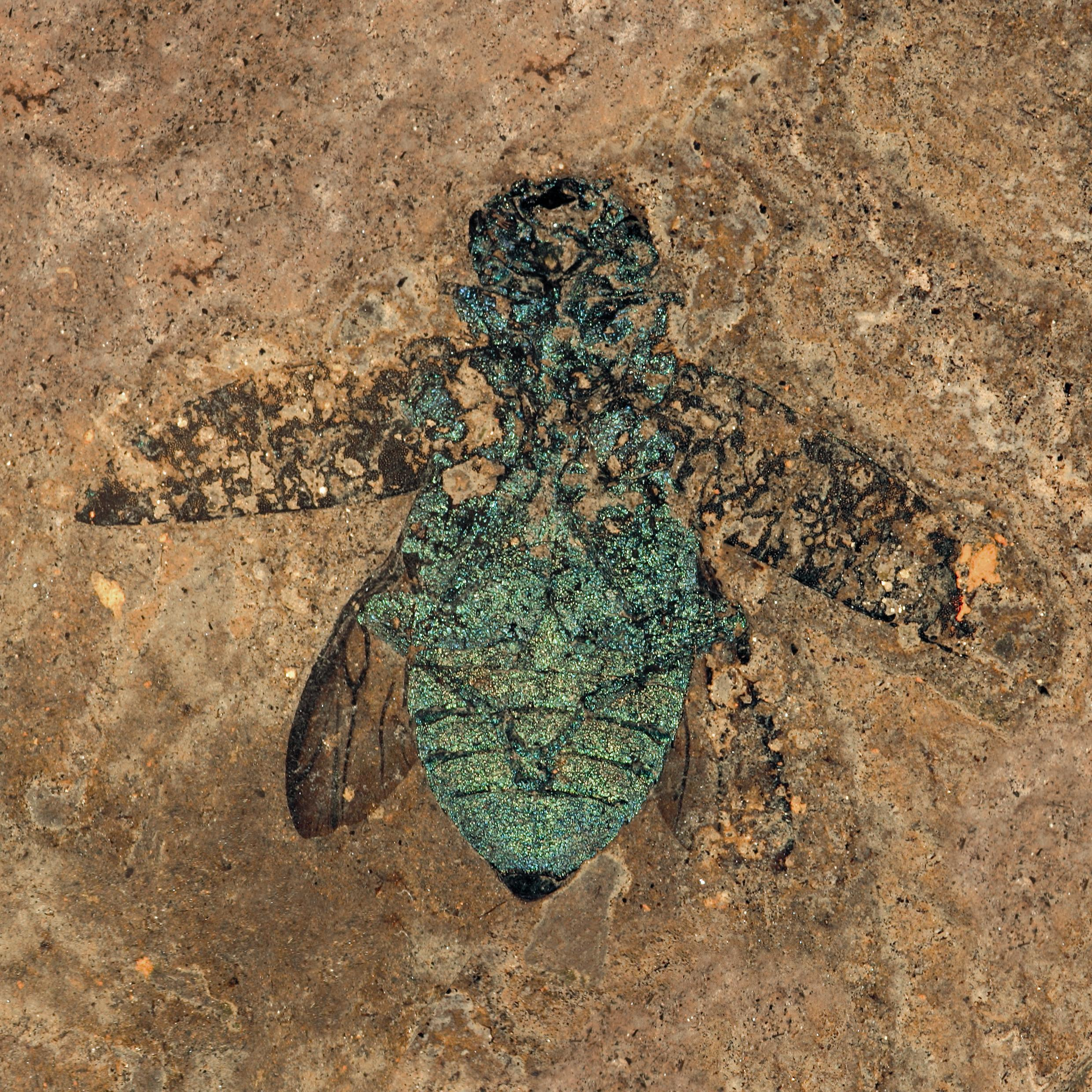 Der Prachtkäfer (Buprestidae) aus der Grube Messel weist noch erhaltene Strukturfarben auf.